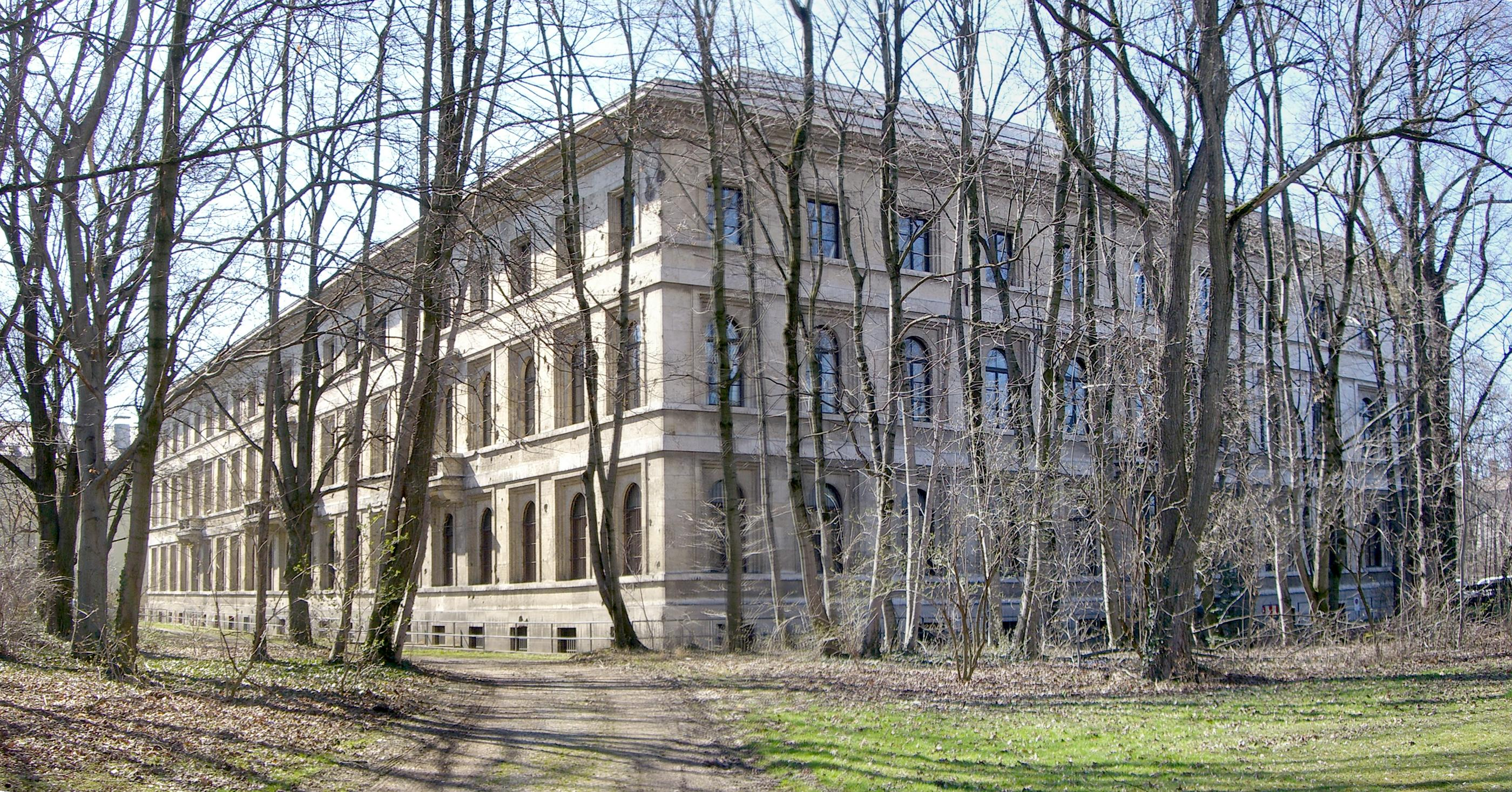 Museum für Abgüsse klassischer Bildwerke (Gebauderückseite)